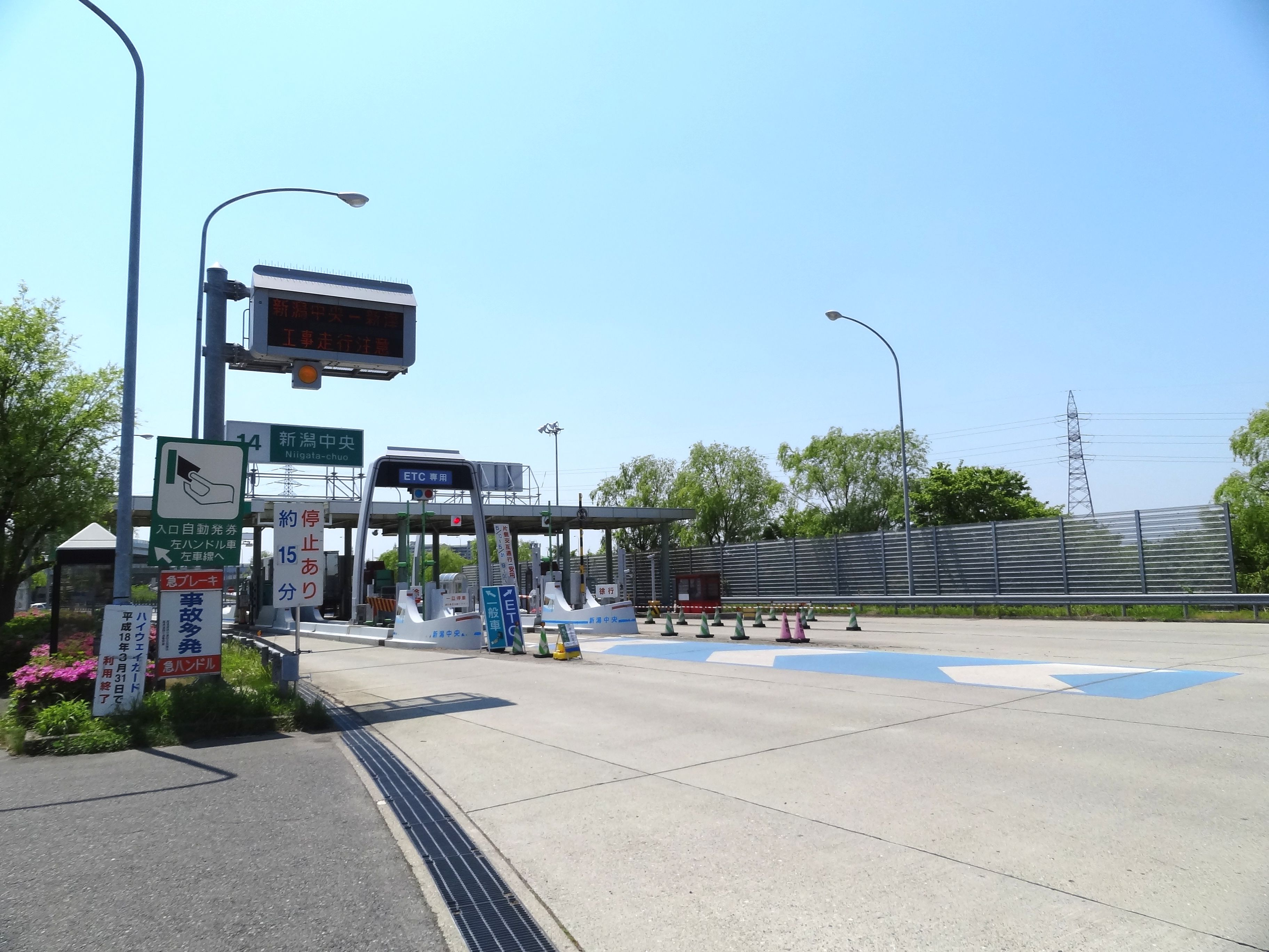 磐越自動車道 新潟中央インターチェンジ